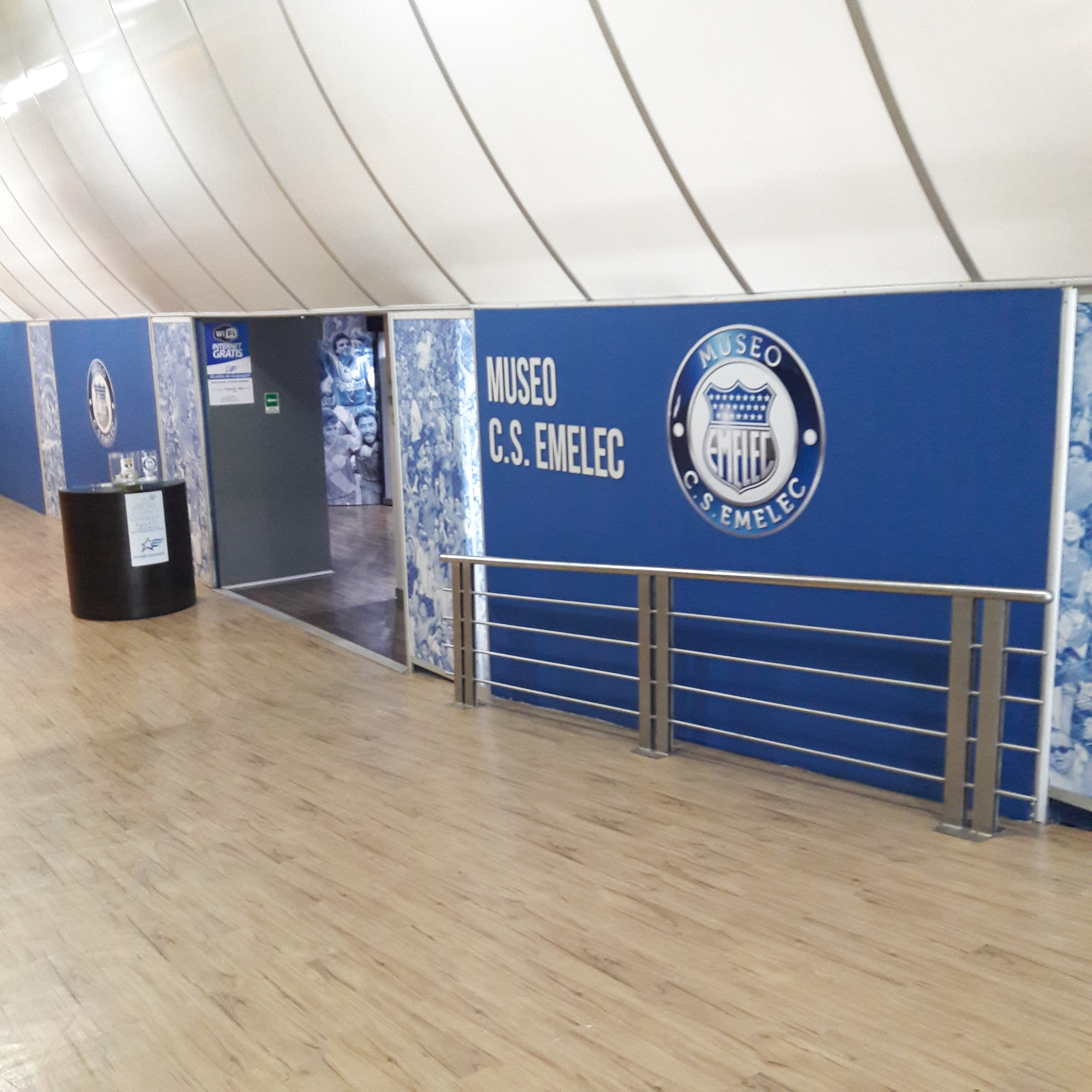 Museo de Emelec